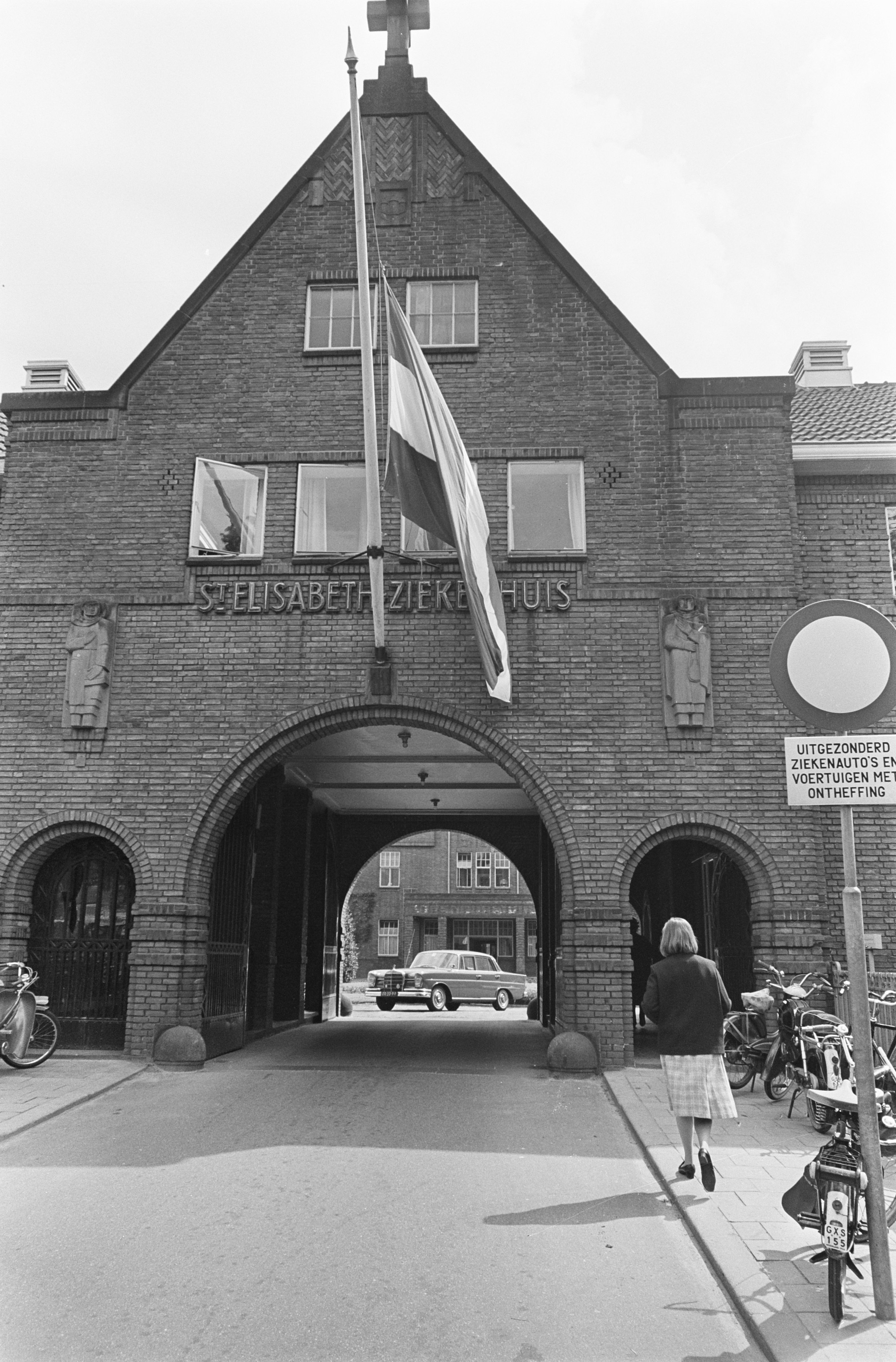 Collectie / Archief : Fotocollectie Anefo Reportage / Serie : [ onbekend ] Beschrijving : Mgr. Bekkers overleden, de ingang van het St. Elizabeth ziekenhuis te Tilburg, vlag halfstok Datum : 9 mei 1966 Locatie : Noord-Brabant, Tilburg Trefwoorden : bisschoppen, ziekenhuizen Persoonsnaam : Bekkers, W.M. Fotograaf : Nijs, Jac. de / Anefo Auteursrechthebbende : Nationaal Archief Materiaalsoort : Negatief (zwart/wit) Nummer archiefinventaris : bekijk toegang 2.24.01.05 Bestanddeelnummer : 919-1232